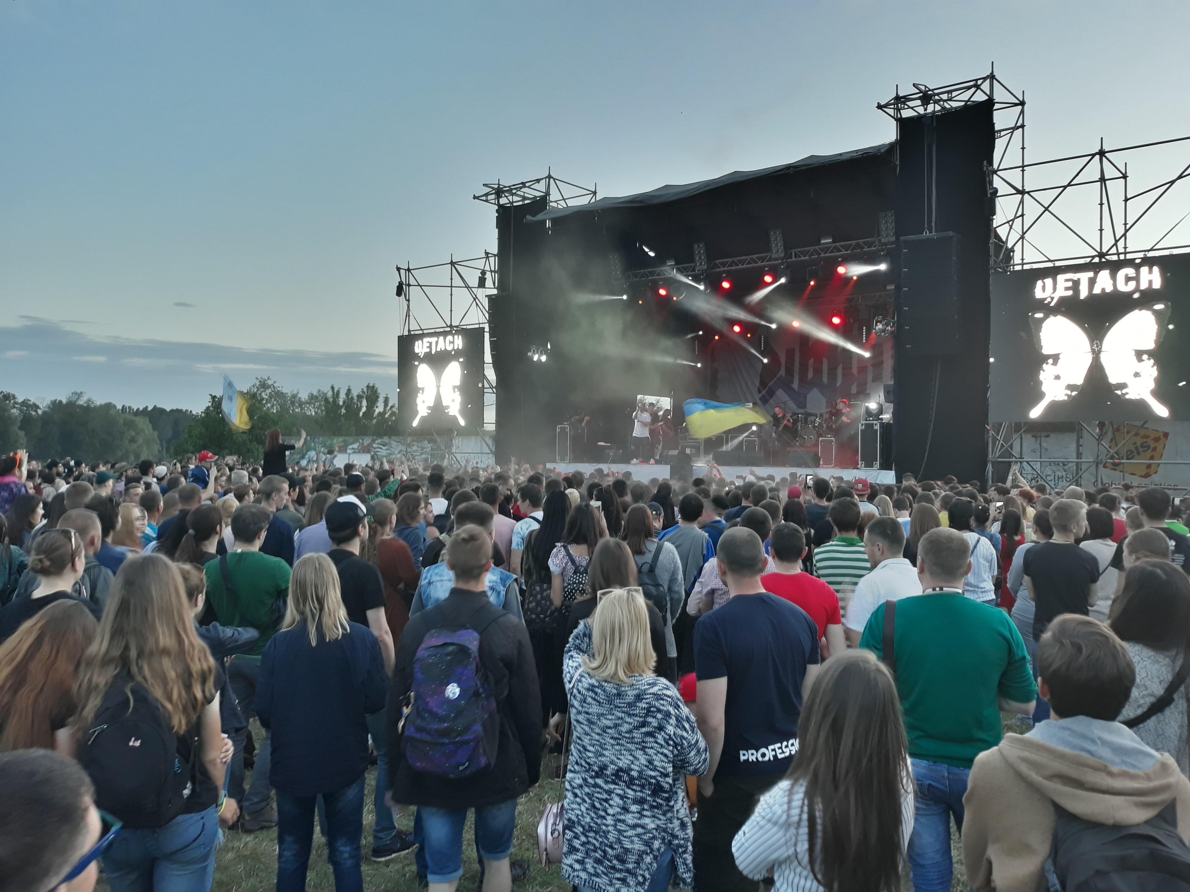 Виступ гурту «DETACH» на фестивалі «Rock&Buh» у Хмельницькому/26.05.2018 Фото: Василь Камінський